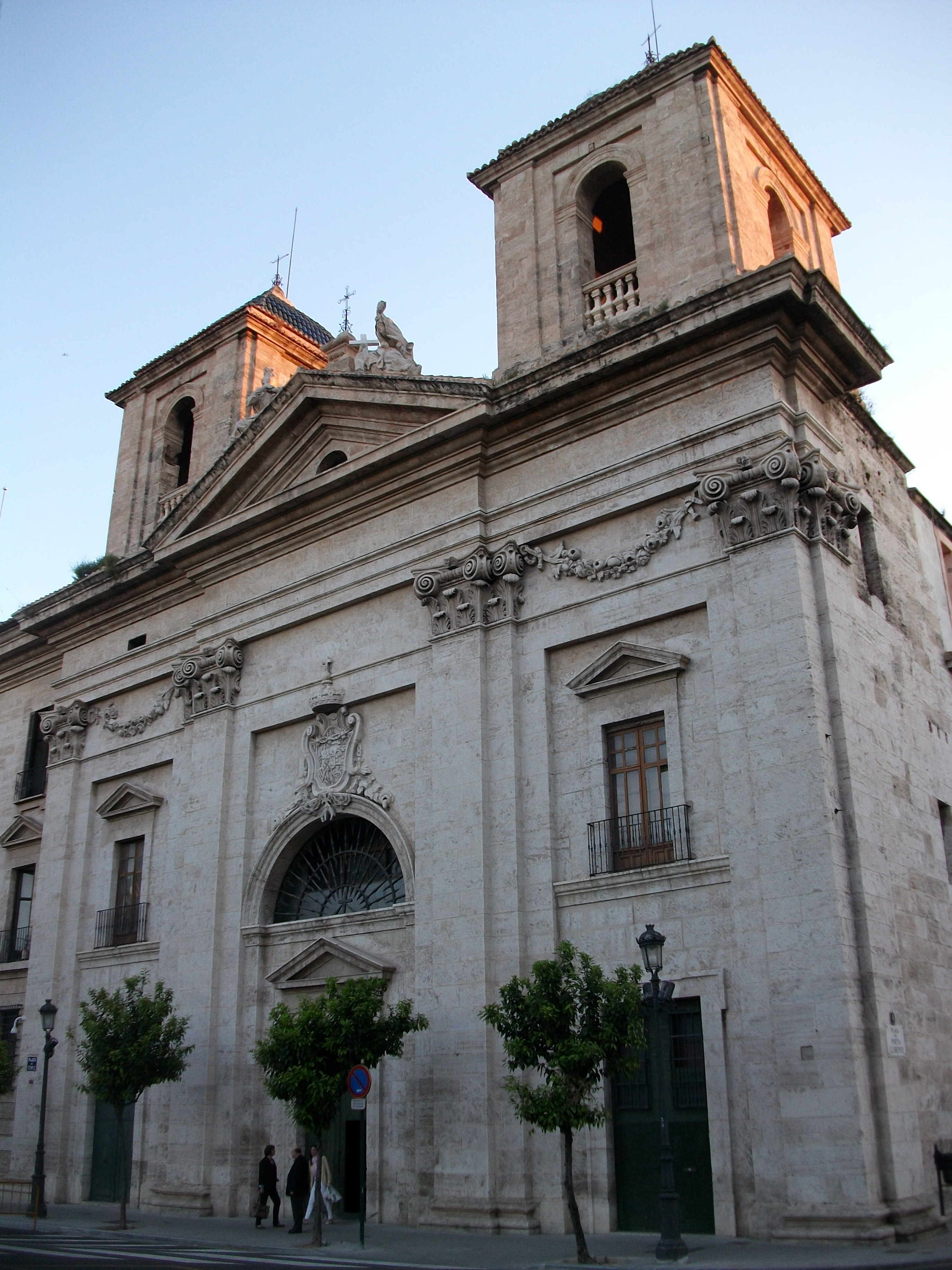 Façana de l'església del Temple, València.